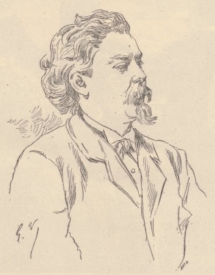 Le vicomte de Motta Maia, professeur à la Faculté de médicine de Rio-Janeiro, Médecin de l'Empereur.